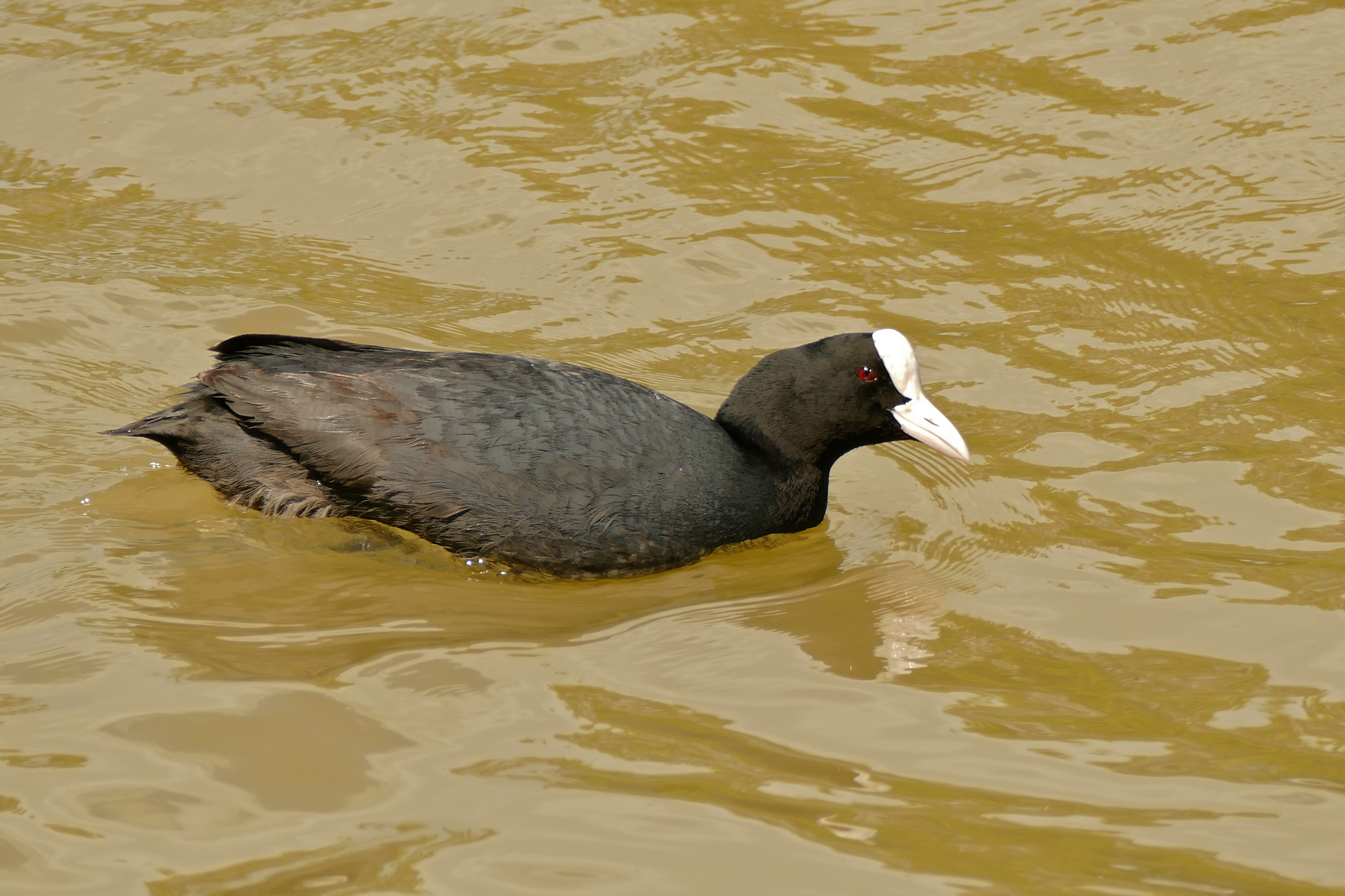 Aguait de les Gantes, Estany del Cortalet, Los Aiguamolls del' Empordà, Castelló d'Empúries, Catalunya, SPAIN